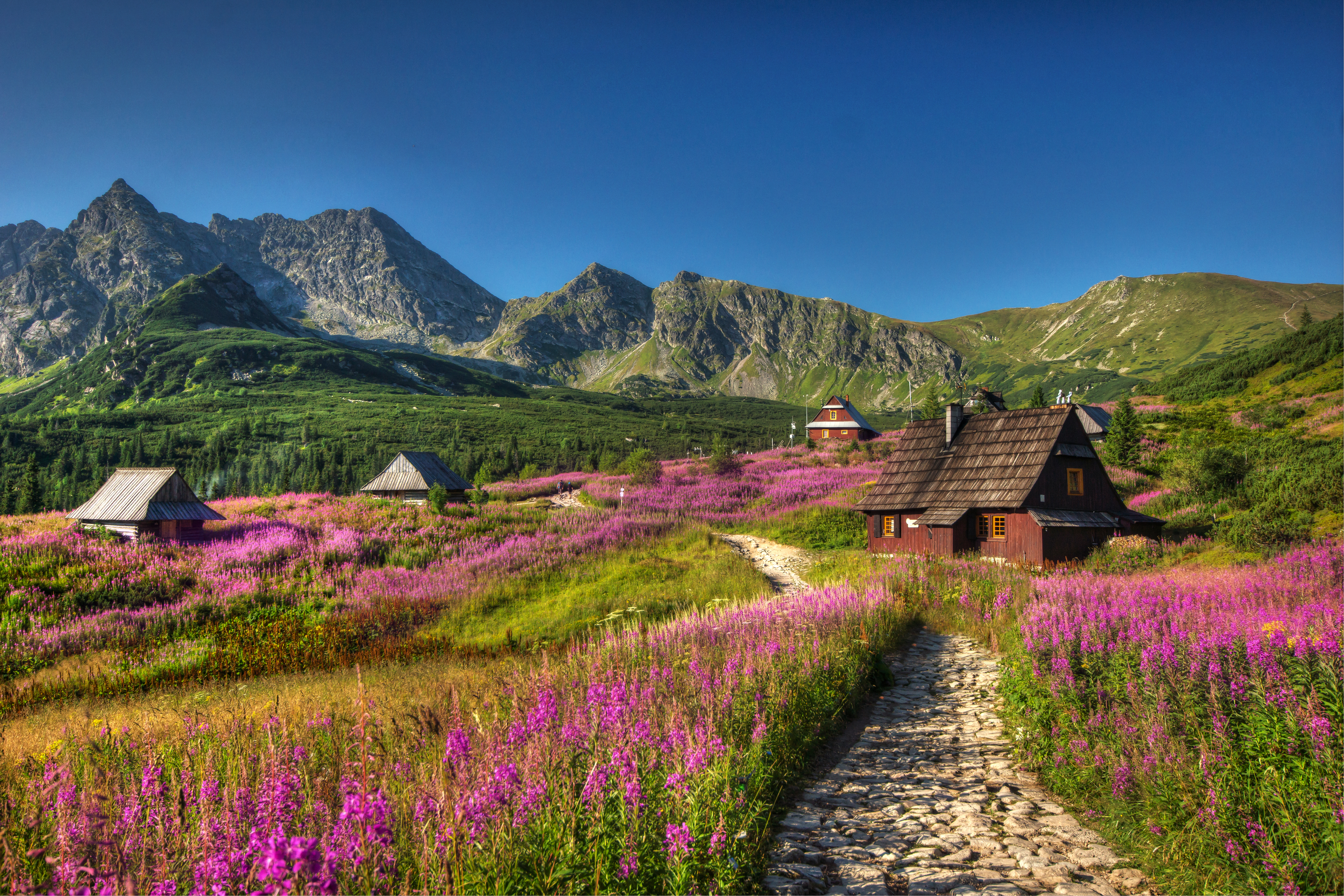 Park narodowy: Tatrzański Park Narodowy Hala Gąsienicowa, Kościelec i Świnica w tle This is a photography of protected area with CRFOP ID PL.ZIPOP.1393.PN.14